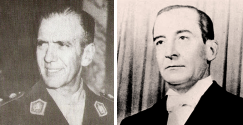 Los Generales Eduardo Lonardi y Pedro Eugenio Aramburu, Revolución Libertadora (1955-1958) de Argentina.